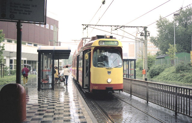 Tram at Duisburg Hbf